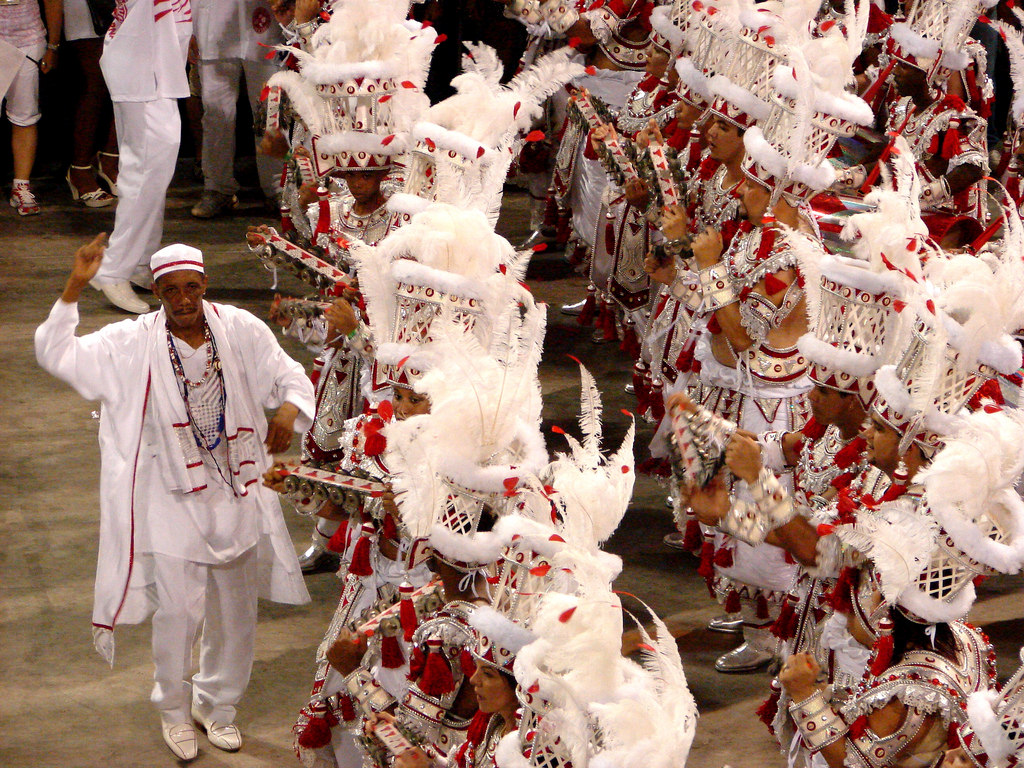 Desfile das escolas de samba do Rio de Janeiro no Sambódromo Grupo Especial Ano 2009 Escola Salgueiro Foto Regina Santelli